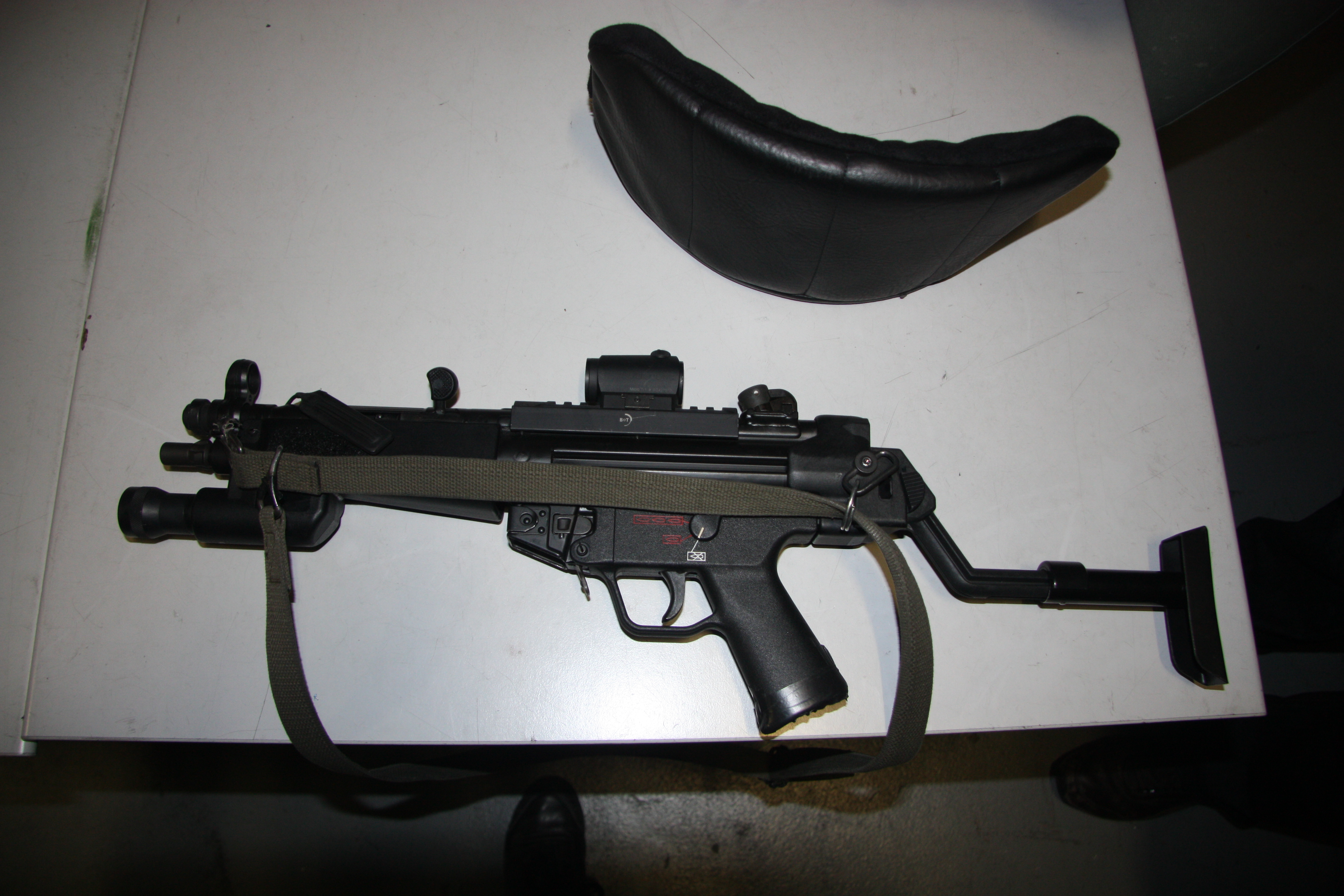 Subfusil H&K MP5A5 utilizado por los miembros del grupo. El subfusil monta un guardamanos Laser Products con linterna y láser rojo. También incluye culata B&T para su uso con pantallas de policarbonato y un visor Aimpoint T-1.